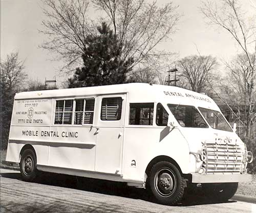 צילום של מעבדת שיניים ניידת מתחילת שנות ה - 50 בישראל